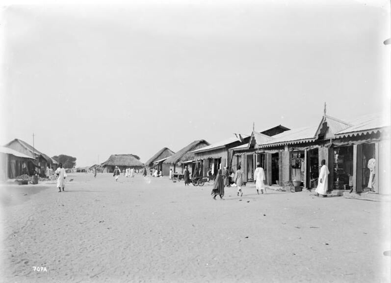 Tabora, Strassenbild